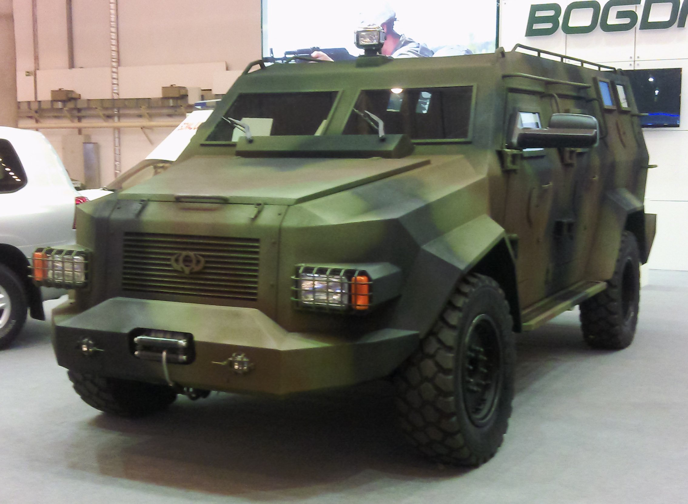 Бронеавтомобиль "Барс-8" на стенде корпорации "Богдан". Выставка "Зброя та безпека", Киев, сентябрь 2015 г.